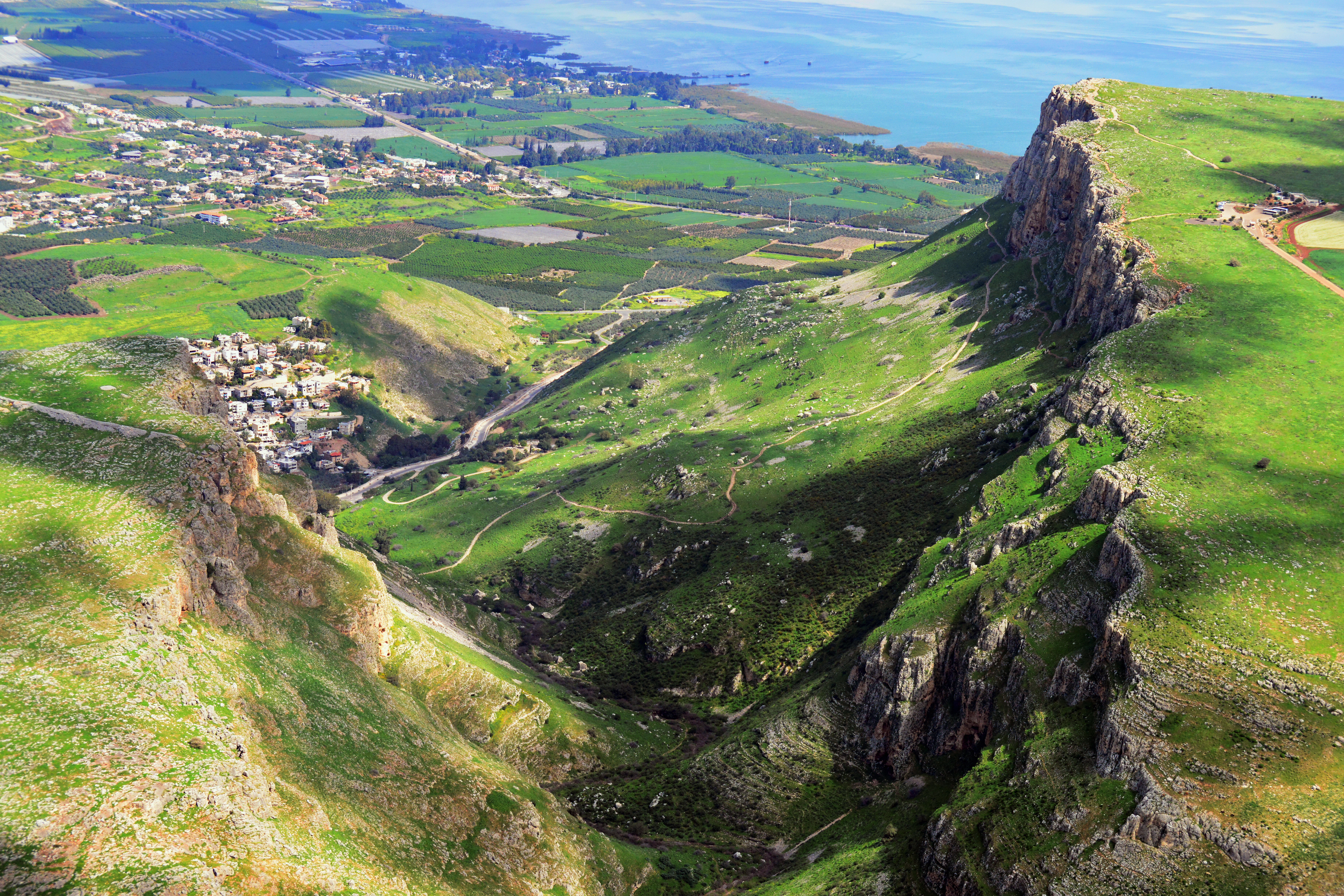 ארבל היה יישוב יהודי שהתקיים כבר בתקופה החשמונאית ושיאו היה בתקופה הרומית ובתקופה הביזנטית בימי המשנה והתלמוד. היישוב שכן בבקעת ארבל, באזור בו שוכן היום מושב ארבל. מהיישוב העתיק נשארו מספר שרידים שעיקרם הוא שרידי בית הכנסת הנמצאים מצפון למושב והוא חלק מגן לאומי ארבל.